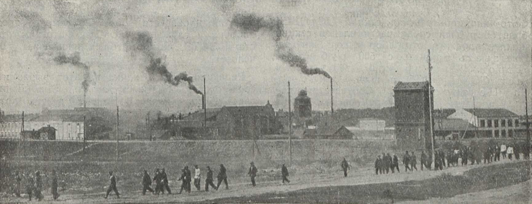 Беларуская (тарашкевіца): Менск (Miensk), вуліца Аранская (vulica Aranskaja). Удалечыні завод «Энэргія»